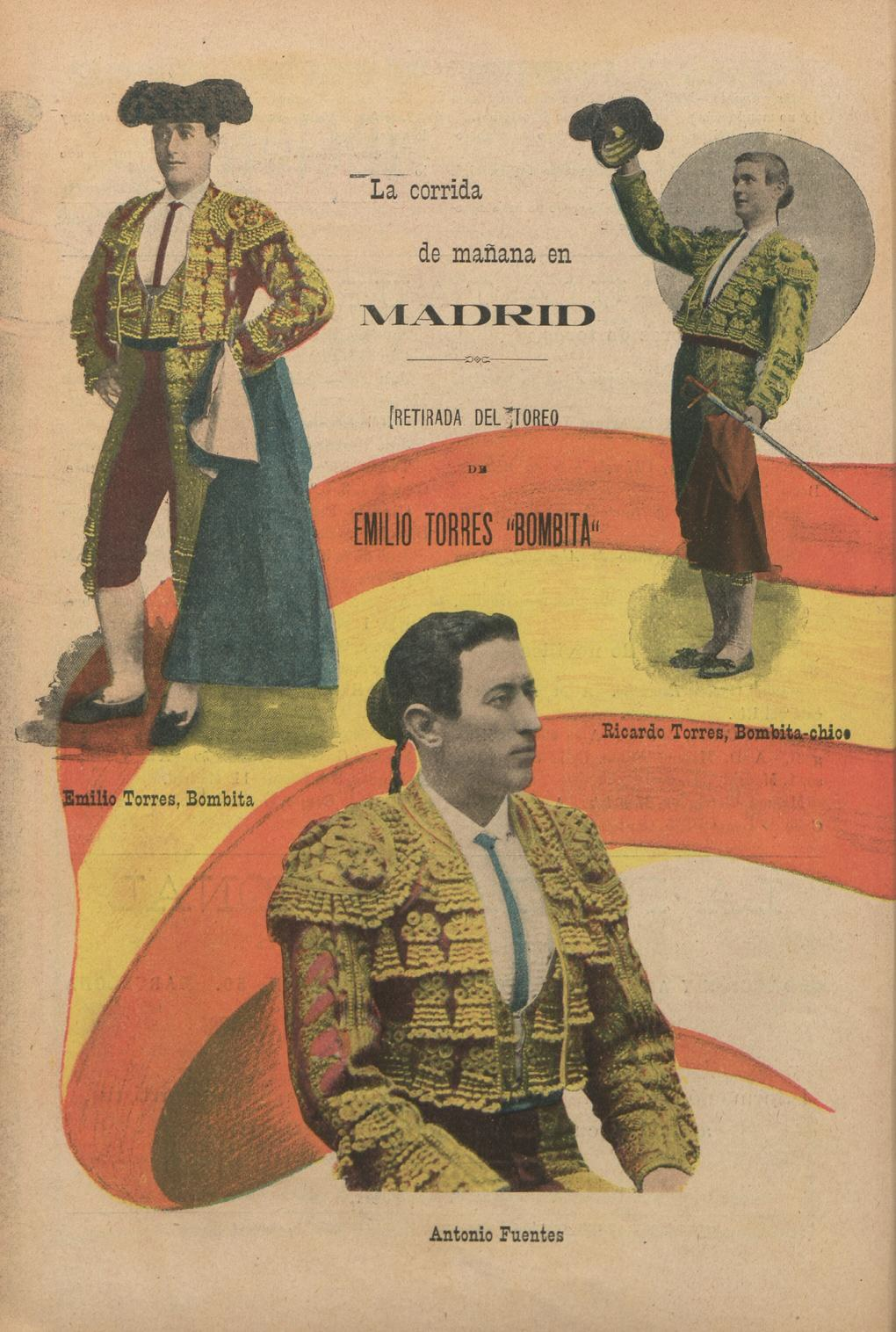 Contraportada de La Fiesta Nacional (Barcelona), 11 de junio de 1904. Cartel de la retirada del toreo de Emilio Torres "Bombita". Terna formada por Bombita, Bombita chico y Antonio Fuentes